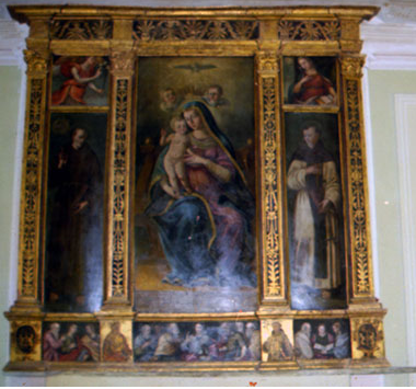 polittico 1700